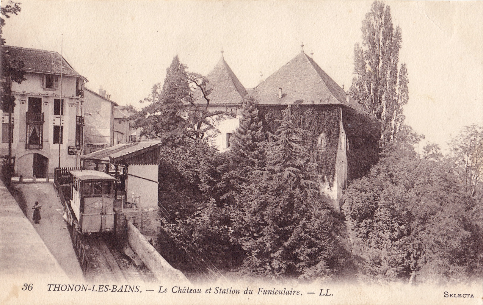 Carte postale ancienne éditée par LL n° 36, collection Sélecta : THONON-LES-BAINS - Le Chateau et station du Funiculaire